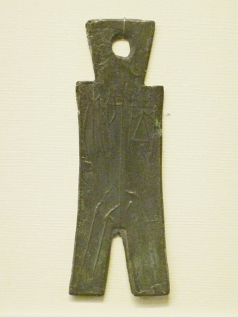 旆钱当釿正面，钱文或释读为“殊布当釿”、“扶布当十”、“橈比當釿”等，拍摄于中国钱币博物馆